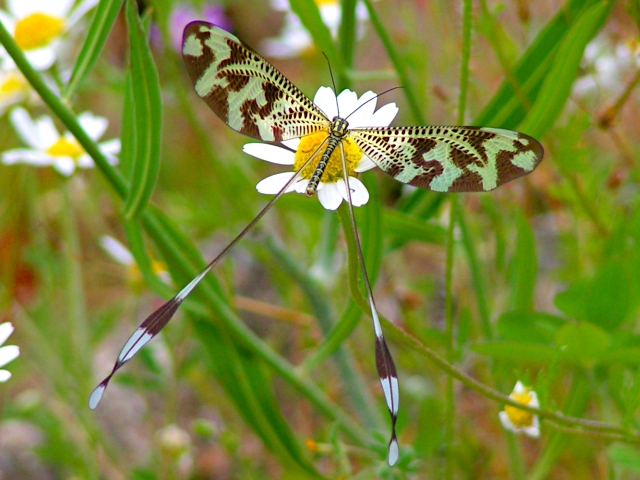 Nemoptera bipennis